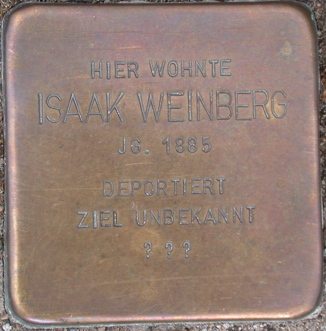 Deutschland - Nordrhein-Westfalen - Kreis Lippe - Bad Salzuflen - Schötmar, Schülerstraße 18: Stolperstein zur Erinnerung an Isaak Weinberg